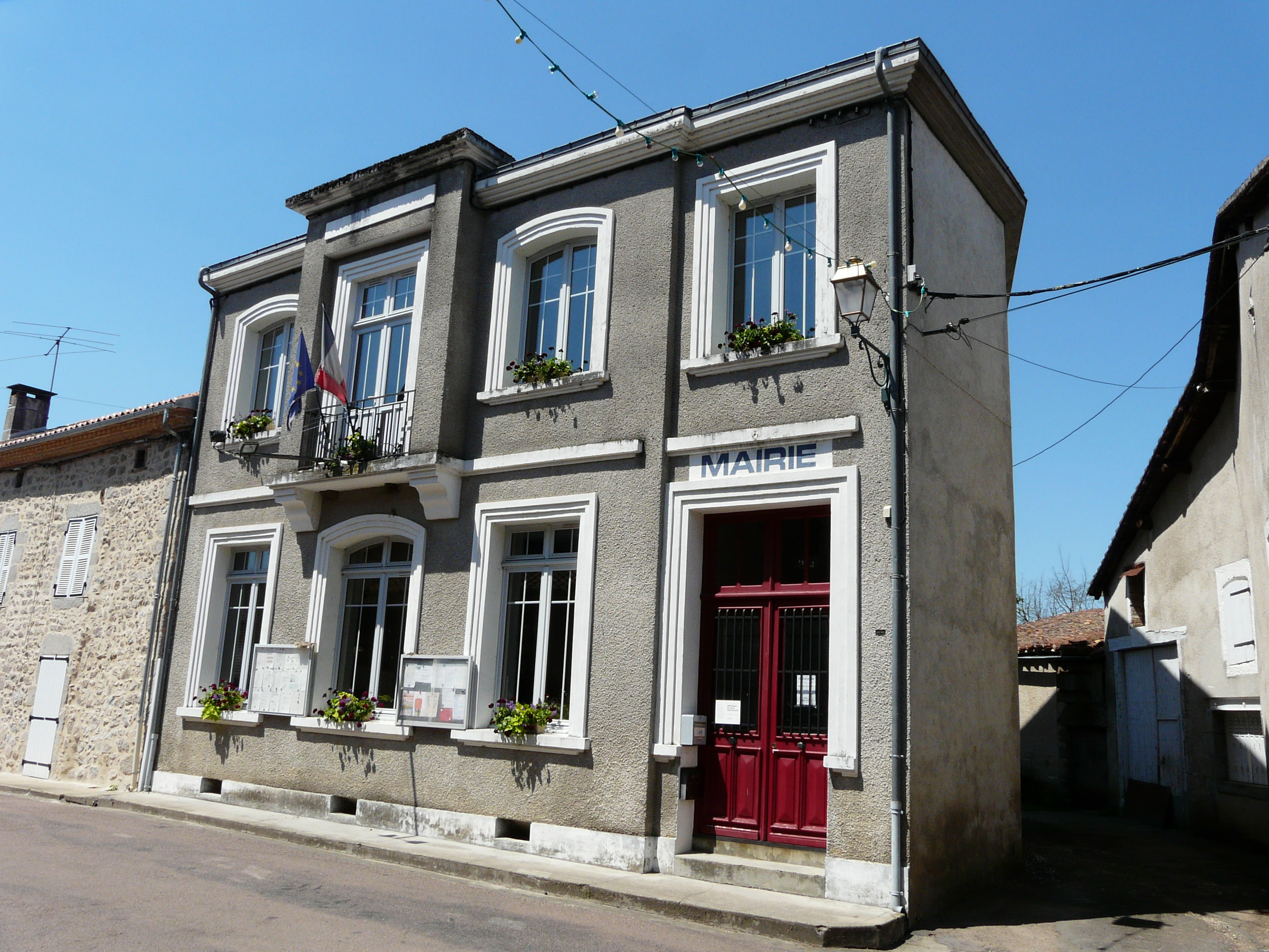 La mairie de Busserolles, Dordogne, France.